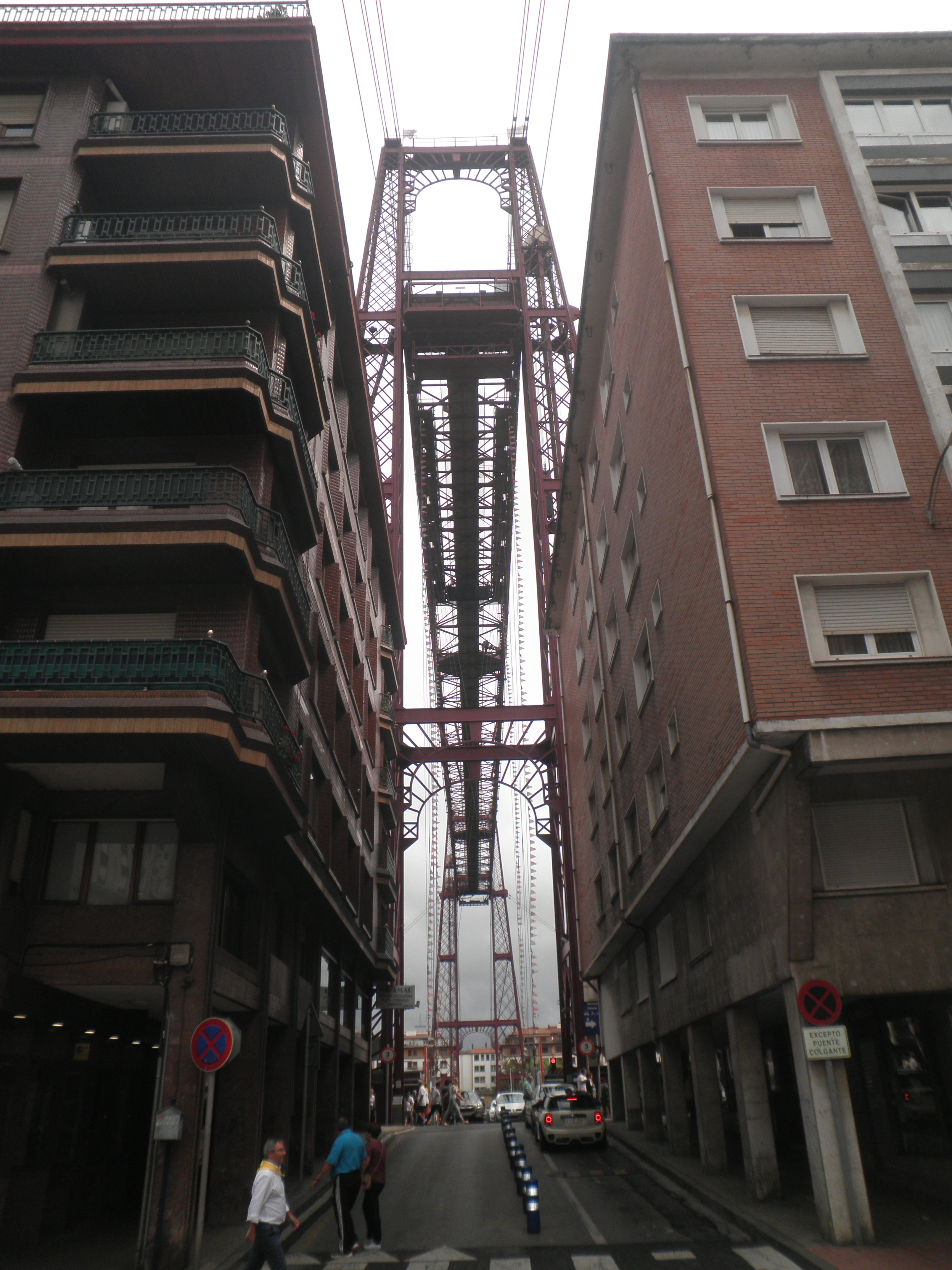 Puente Bizkaia o Puente Colgante